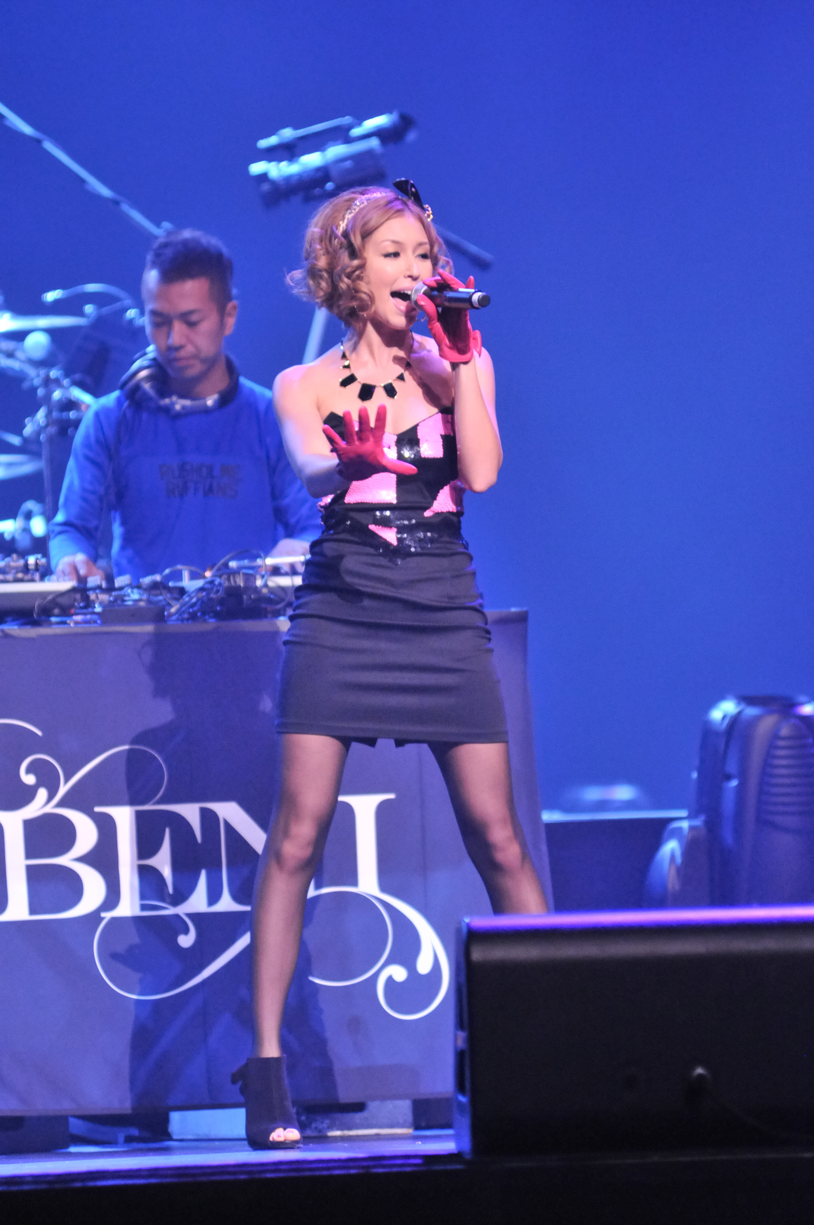 ax10beni01